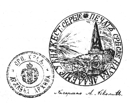 Нацрт печата ДСС, цртеж А. Николића 1841